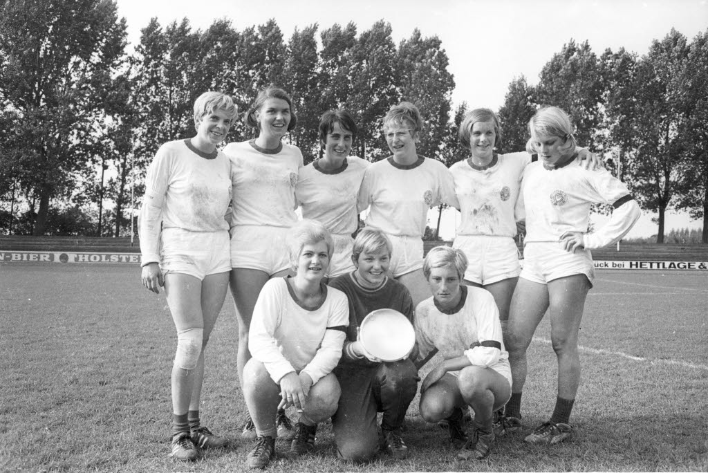 ist Norddeutscher Meister auf dem Kleinfeld. Im Bild v.l.n.r.: Erika Gaedicke, Anke Sengebusch, Gisela Doerks, Angelika Heitmann, Ursula Ehlers, Dagmar Neutze. Kniend v.l.n.r.: Renate Krahe, Karin Witthinrich, Renate Plewe.